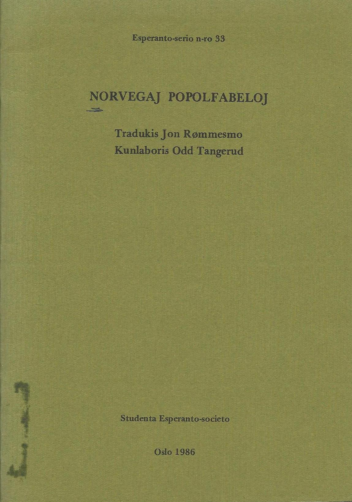 librokovrilo de "Norvegagj Popolfabeloj", 1986